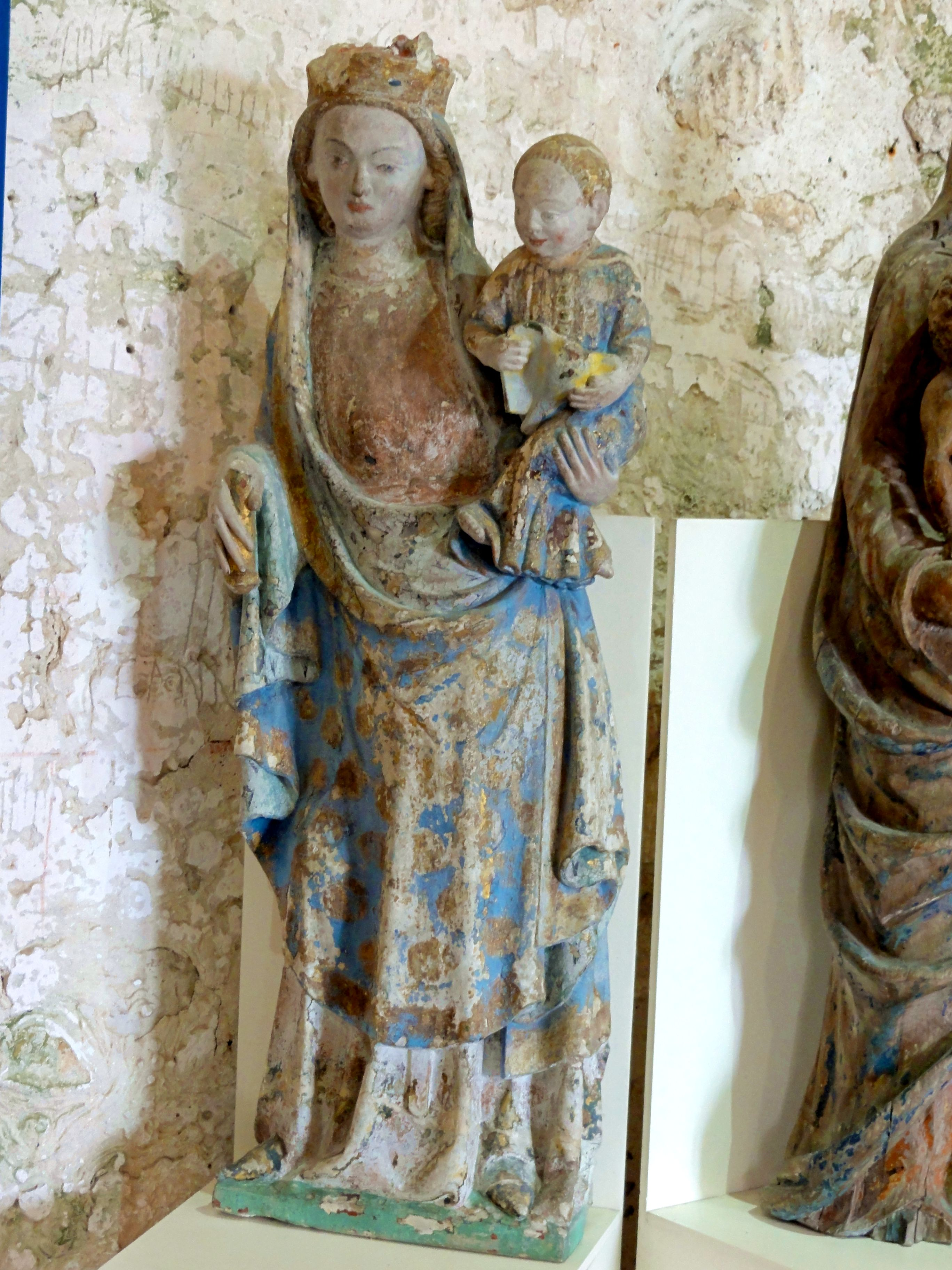 Vierge à l'Enfant en pierre polychrome, XIVe s., CMH.